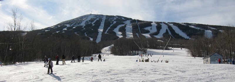 Sugarloaf